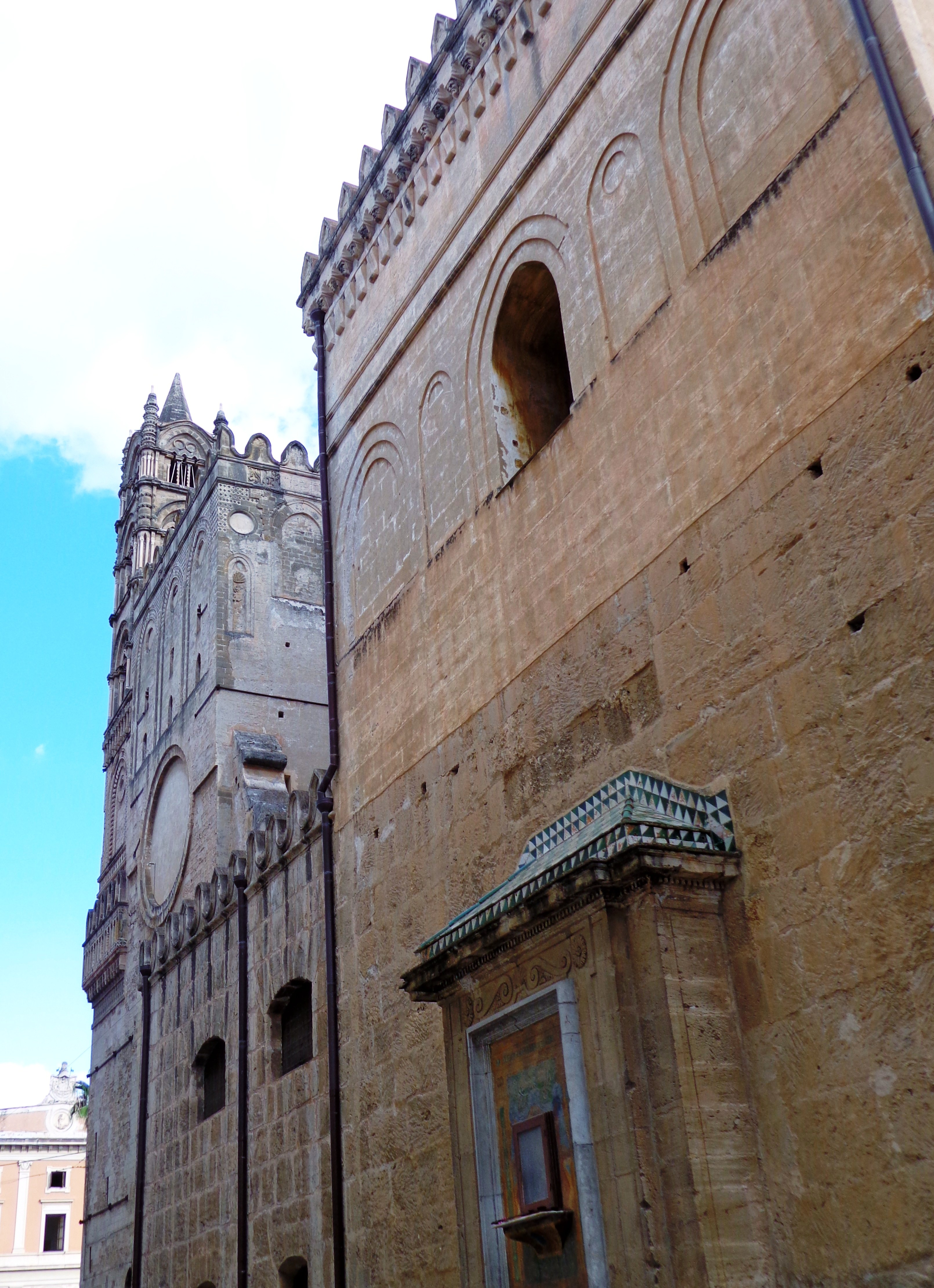 Prospetto parziale Nord Est